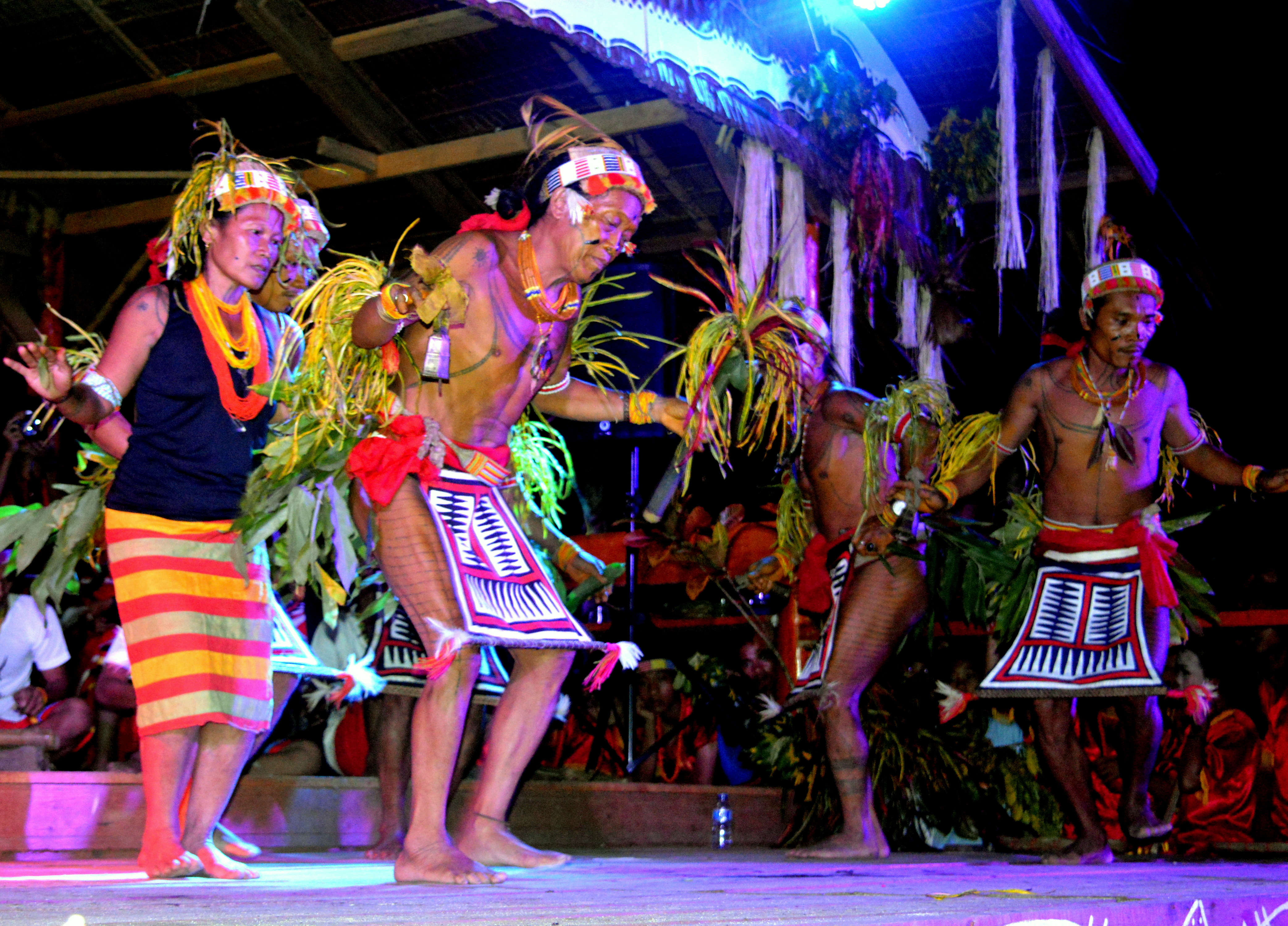 SUKU SIKEREI : Pemilik Seni Tatto Tertua di Dunia.